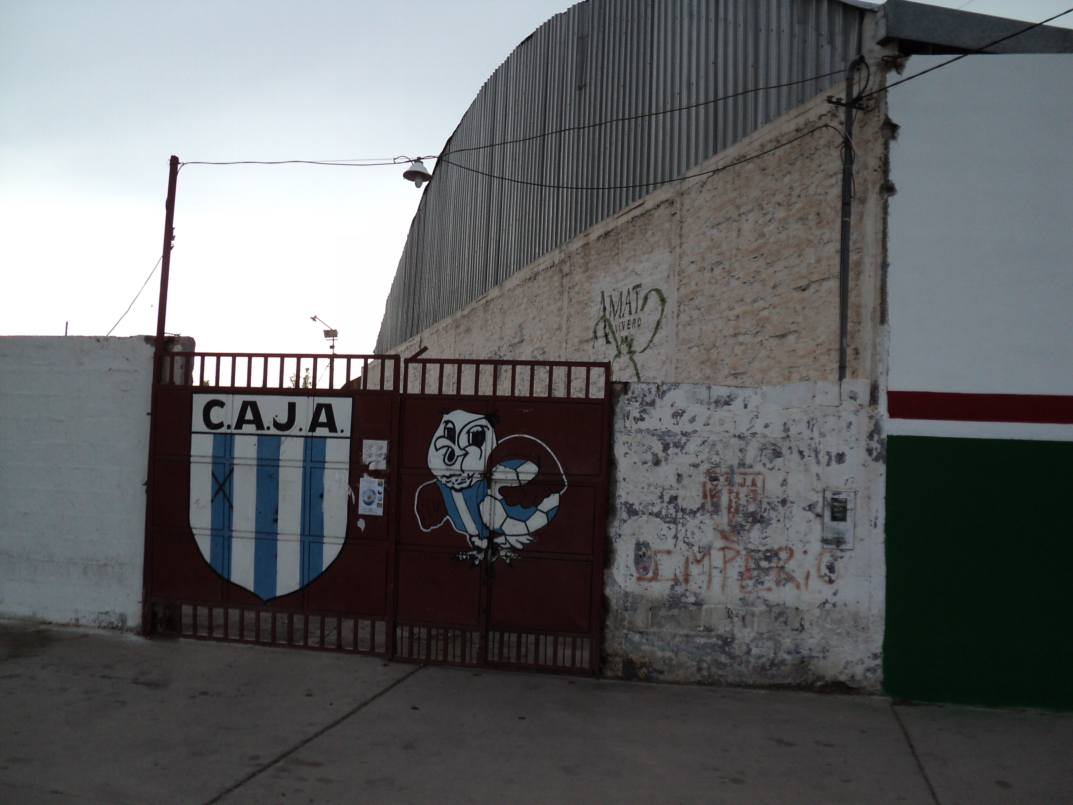 Sede en Santa Lucia de Juventud Alianza